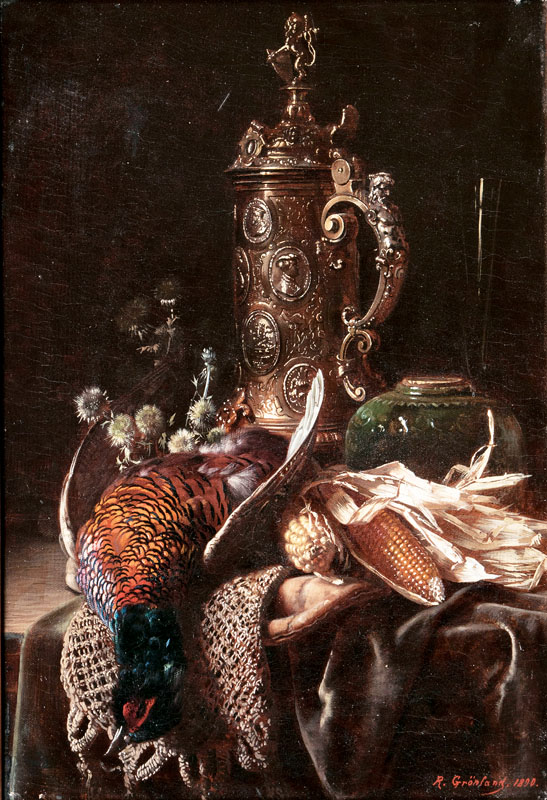 Prunkstilleben mit Humpen und Fasan